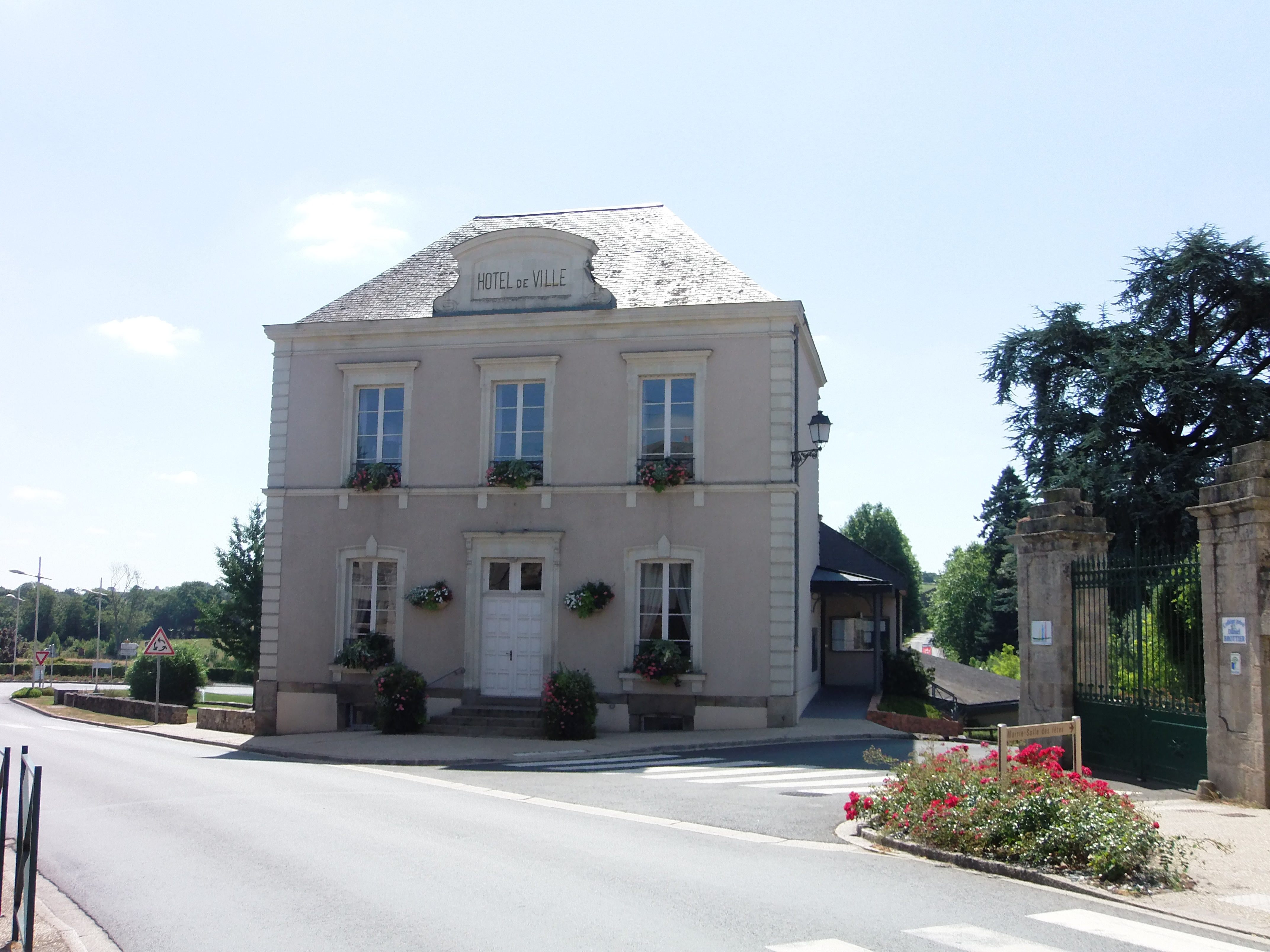 Hôtel de ville de Maulévrier (Maine et Loire, France). Juillet 2015.